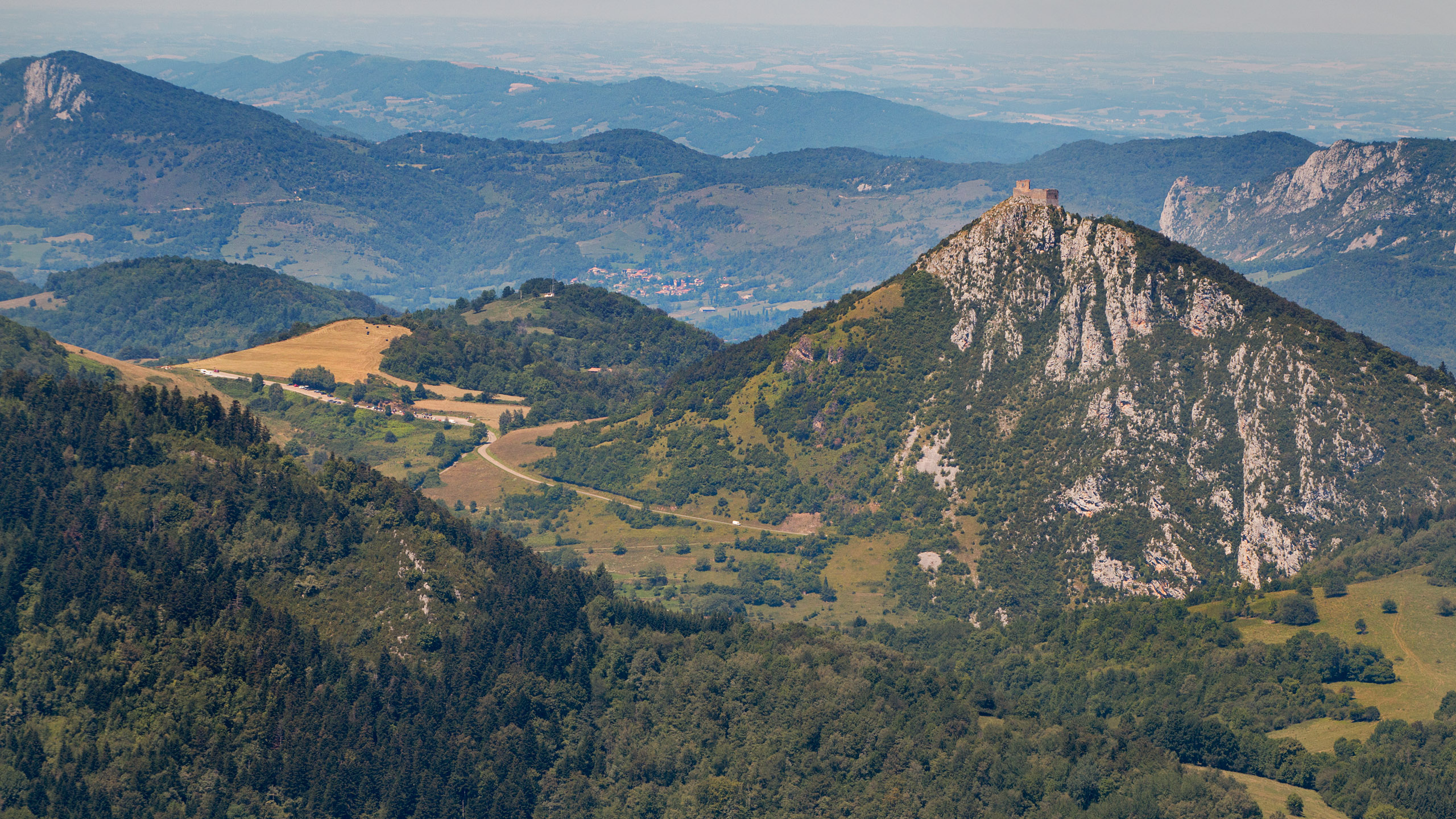 Vue générale